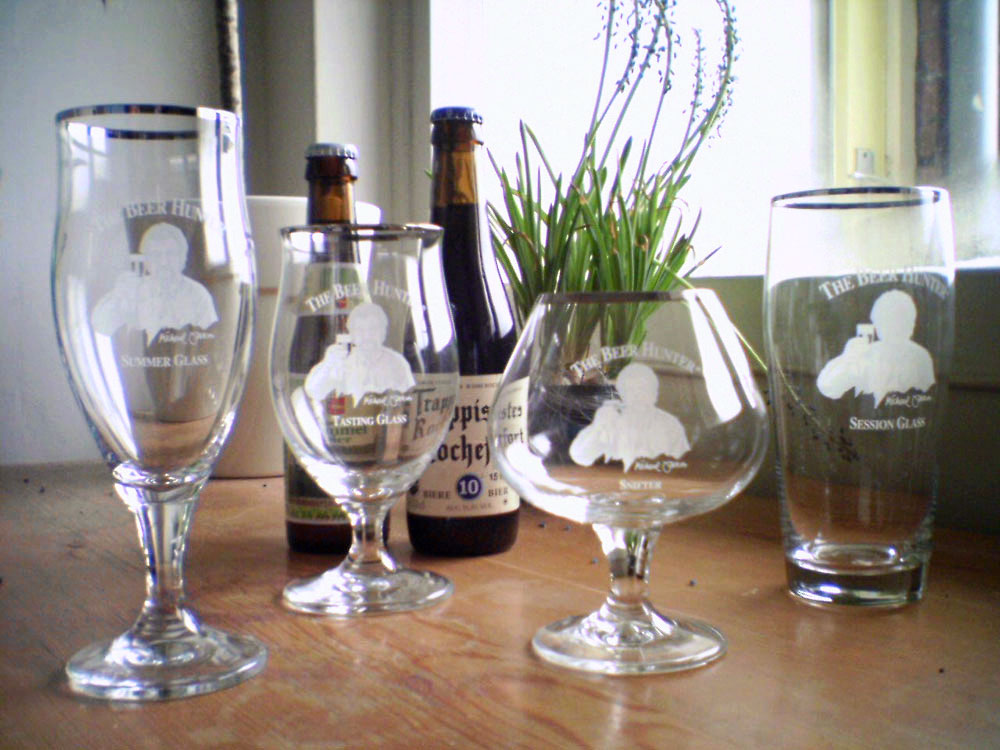 De vier bierglazen uit het bierglazenpakket van Michael Jackson. De glazen zijn afgebeeld met op de achtergrond een fles Trappistes Rochefort 10 en een fles poperings hommelbier. Ik heb de foto zelf gemaakt en stel 'm gaarne beschikbaar aan de wikipedia-gemeenschap, in de hoop dat ik dra niet langer de enige ben die bier drinkt uit deze fantastische glazen! (en dan is het nu tijd voor het reclame-sjabloon) Categorie:Afbeelding bier